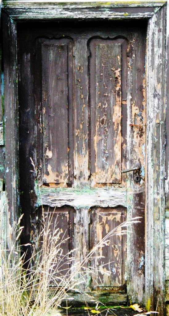 Stuen ble erklært fredet av Riksantikvaren i 1996, photo taken in Arna, Norway (close to Bergen) 2009.